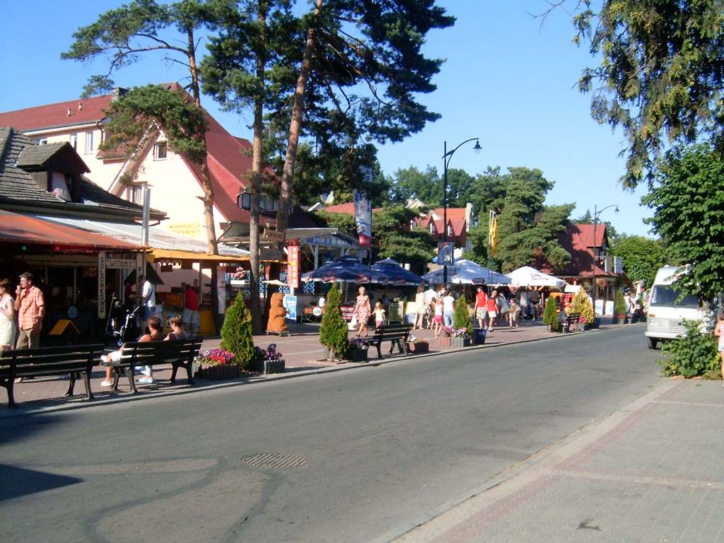 Pobierowo - ulica Grunwaldzka